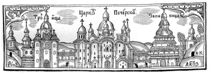 Києво-Печерська лавра на ілюстрації з книги "Пресисті Акафісти всеседмисті", Київ 1677.